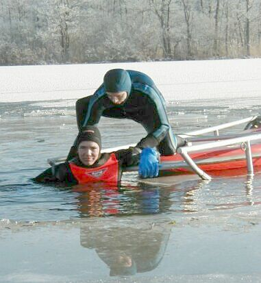 Eisrettung